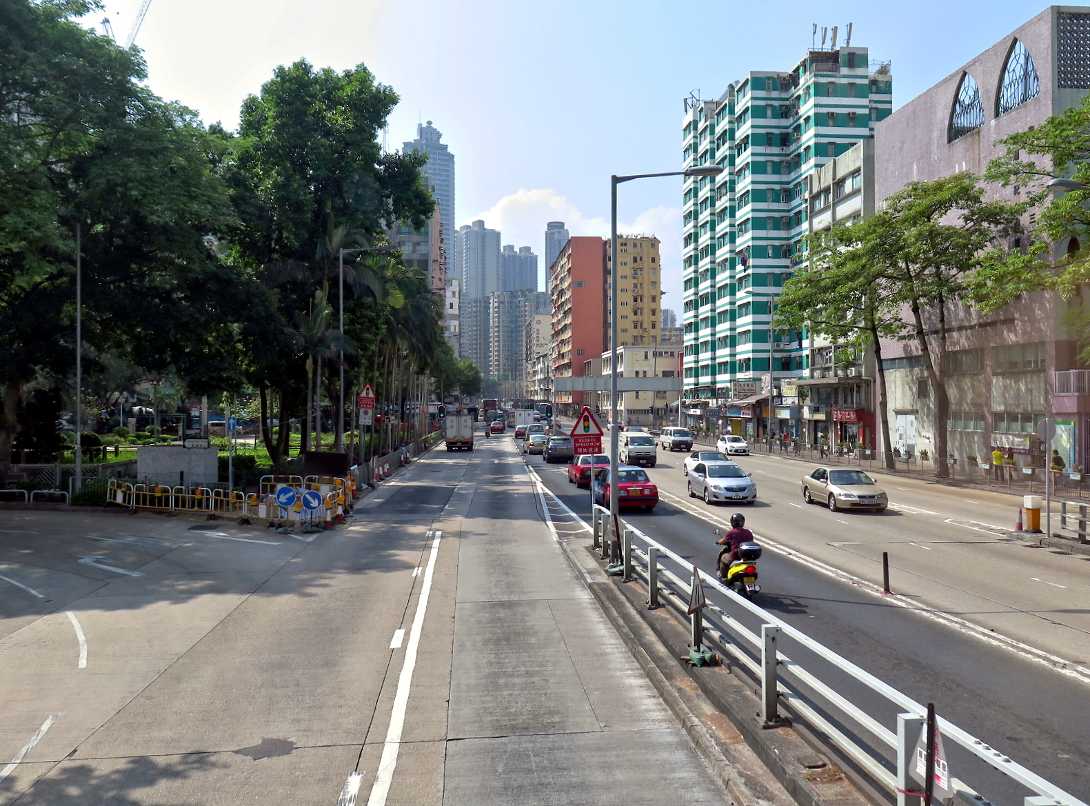 Ma Tau Chung Road